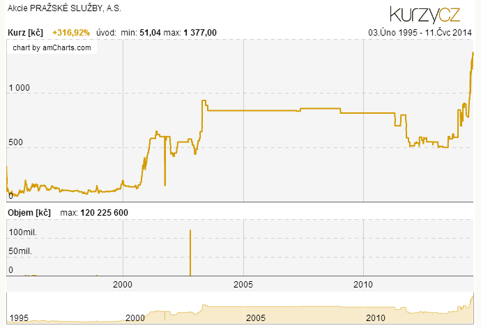 Akcie PRAŽSKÉ SLUŽBY - Graf vývoje kurzu na Burze Praha.